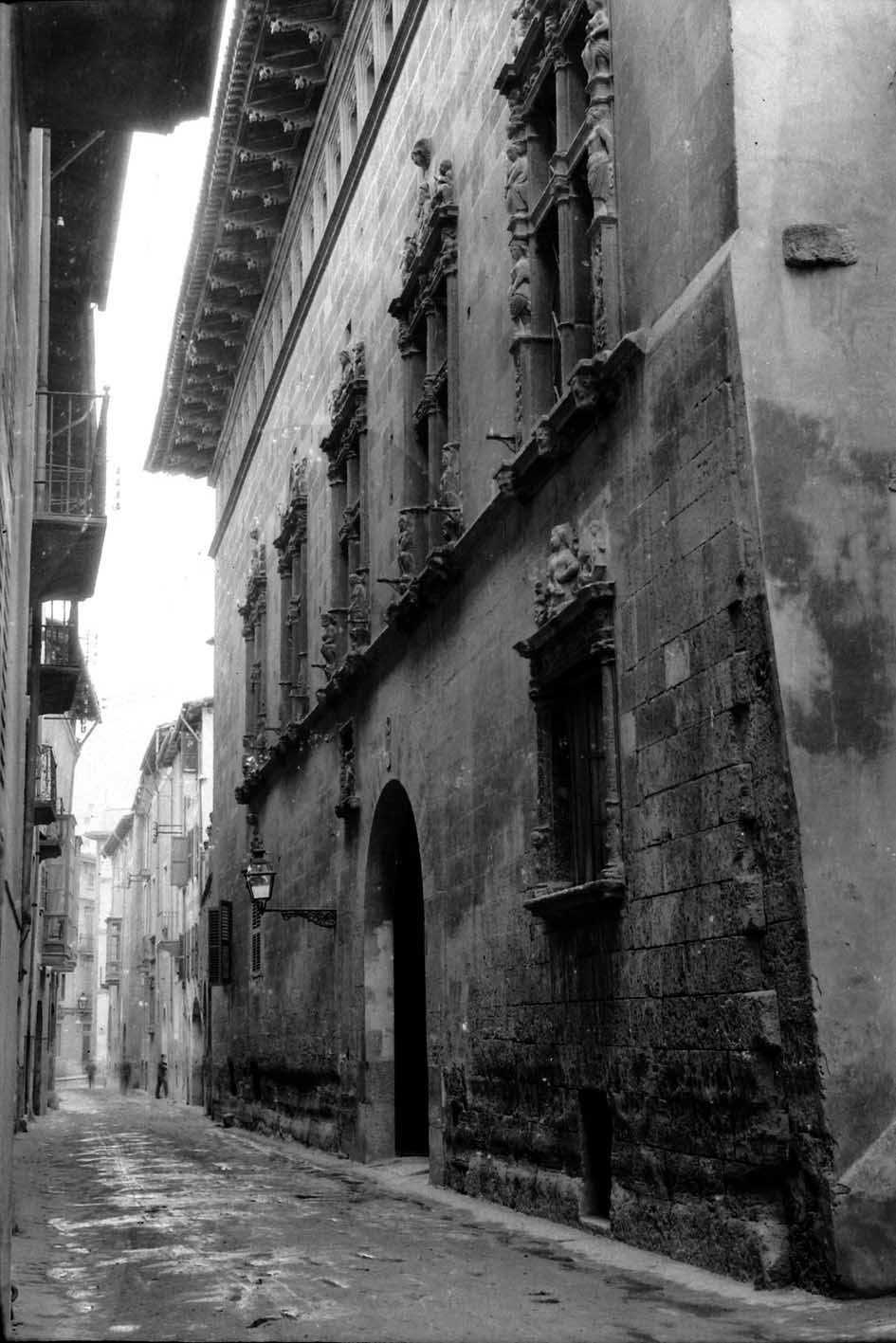 Casa Marquès de Palmer. Francesc Matheu i Fornells (1920)